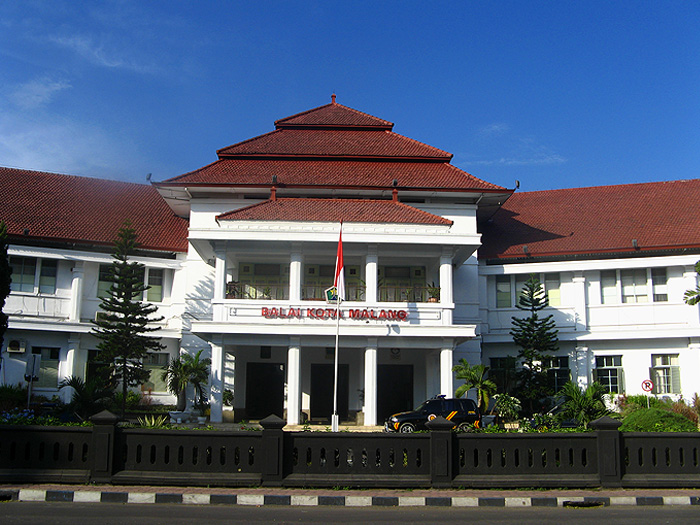 Kantor Balai Kota Malang, Jawa Timur, Indonesia